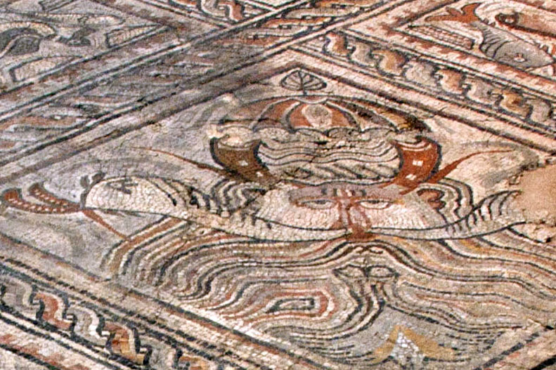 Mosaïque du Dieu Océan du domaine de Saint-Girons, Espace-Muséographique de Maubourguet, Maubourguet, Hautes-Pyrénées, France